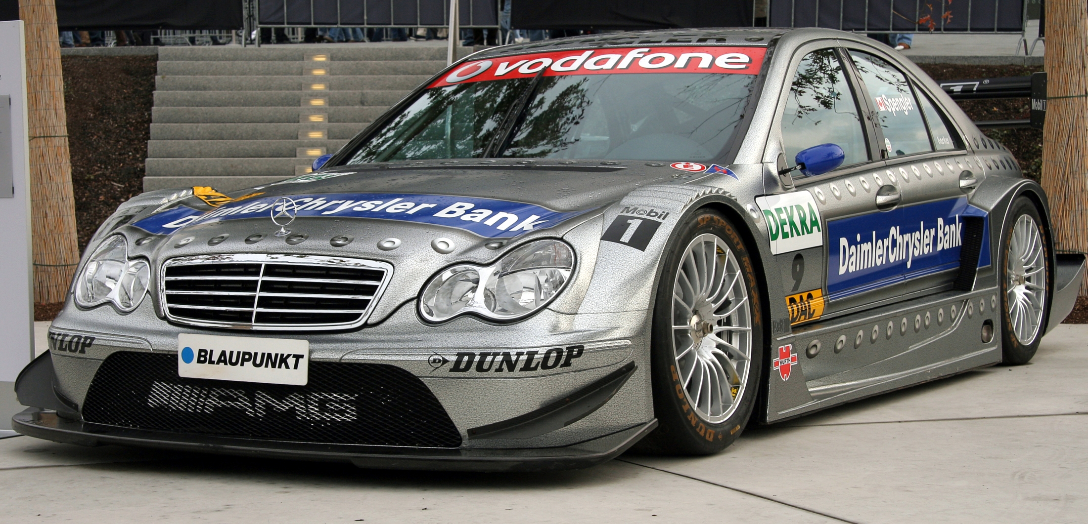 DTM car Mercedes-Benz AMG 2006 (C-Class, W203), Bruno Spengler (driver)